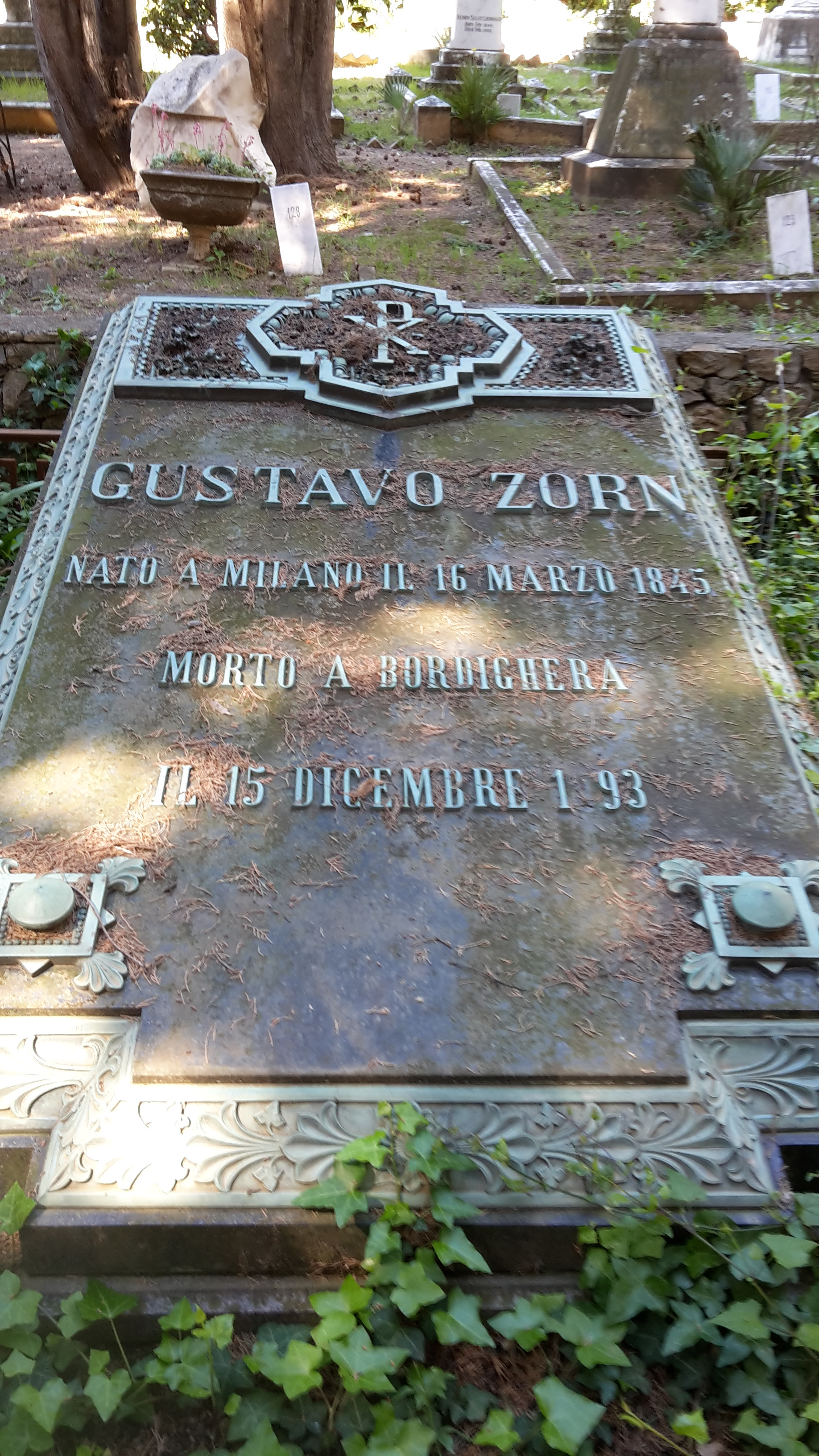 Tomba di Gustav Zorn nel cimitero di Bordighera